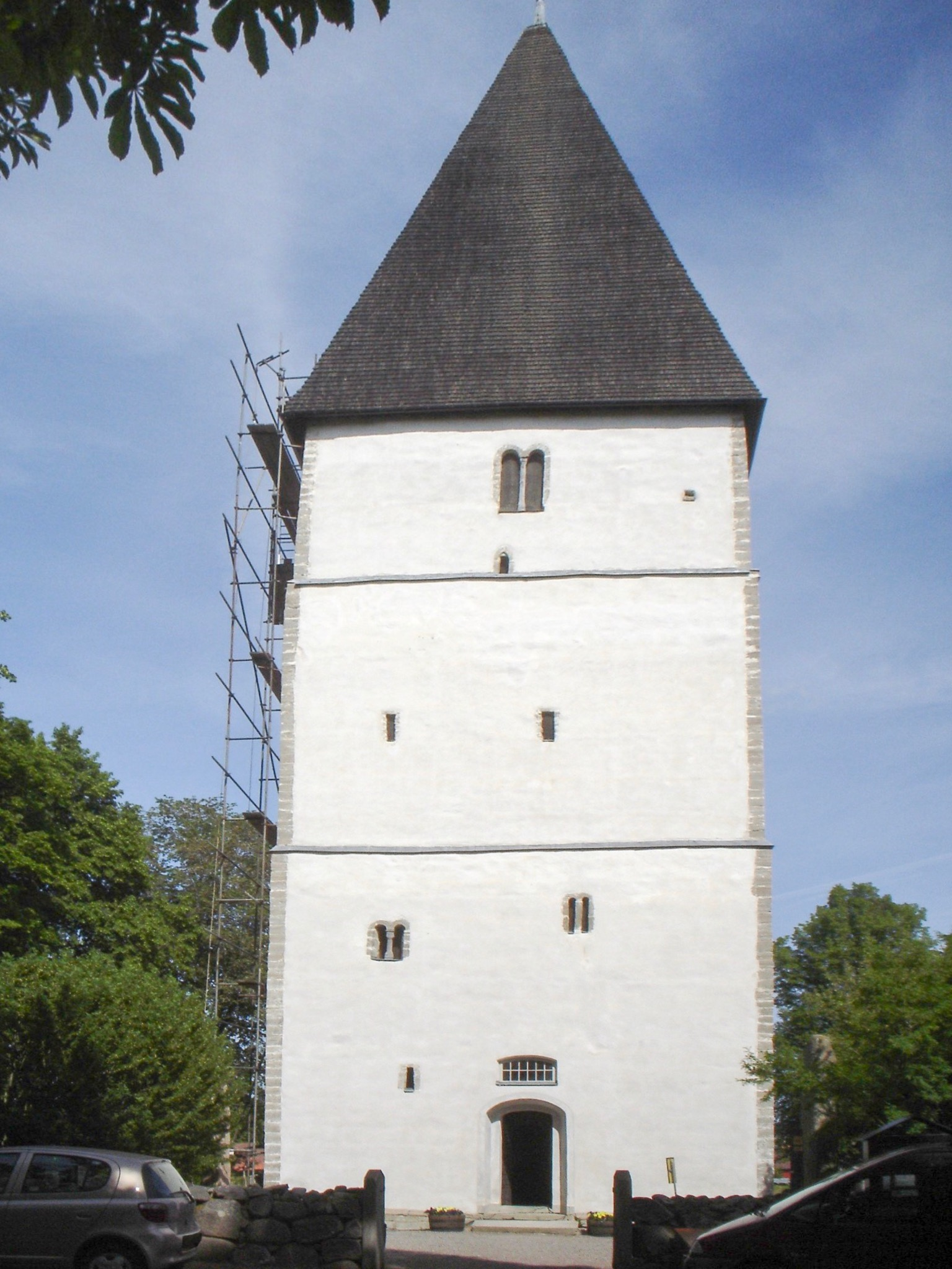 Bjälbo kyrktorn, Östergötland, 15 juni 2006 Fotograf: Gamnacke